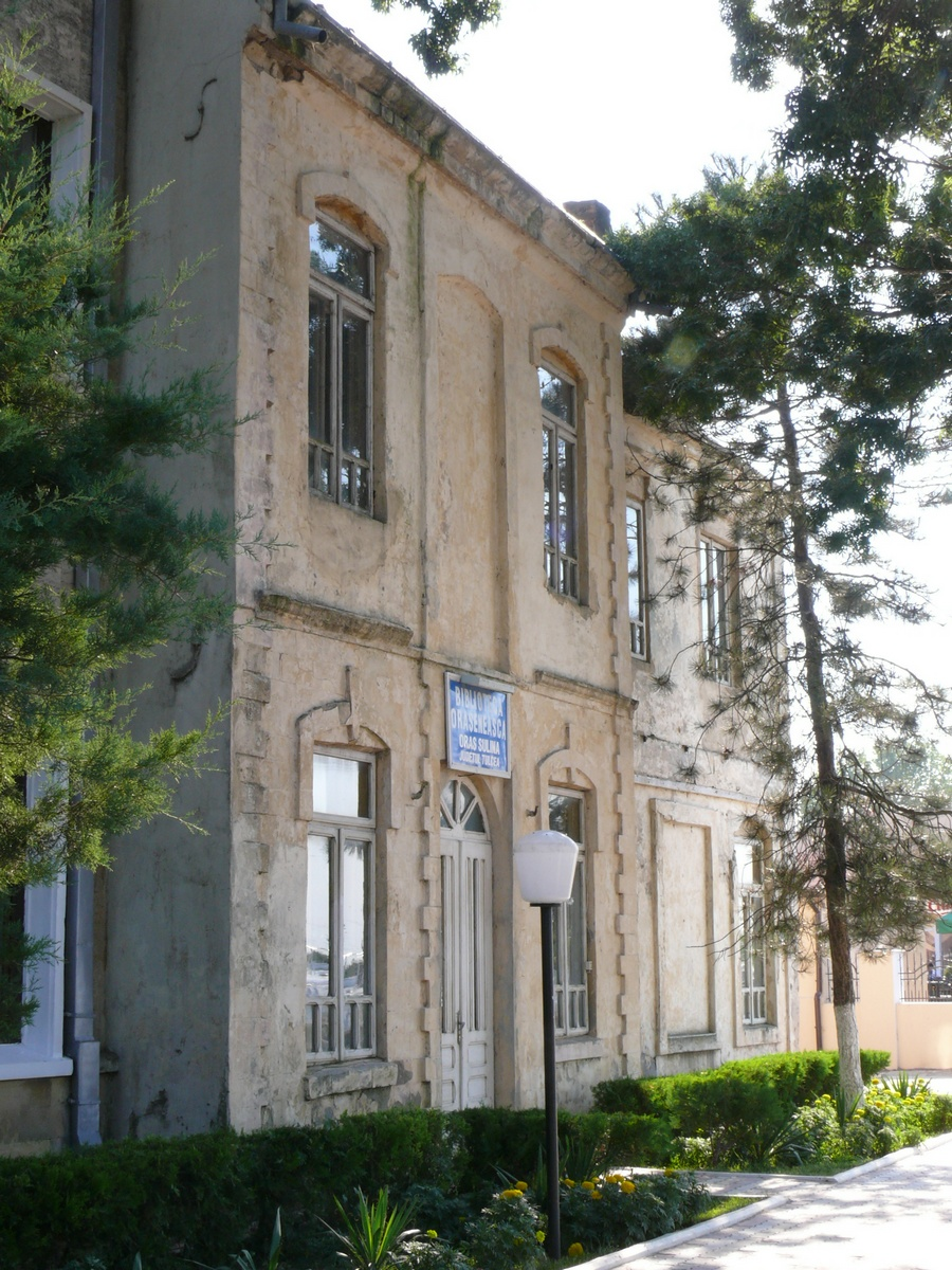 Biblioteca Orășenească